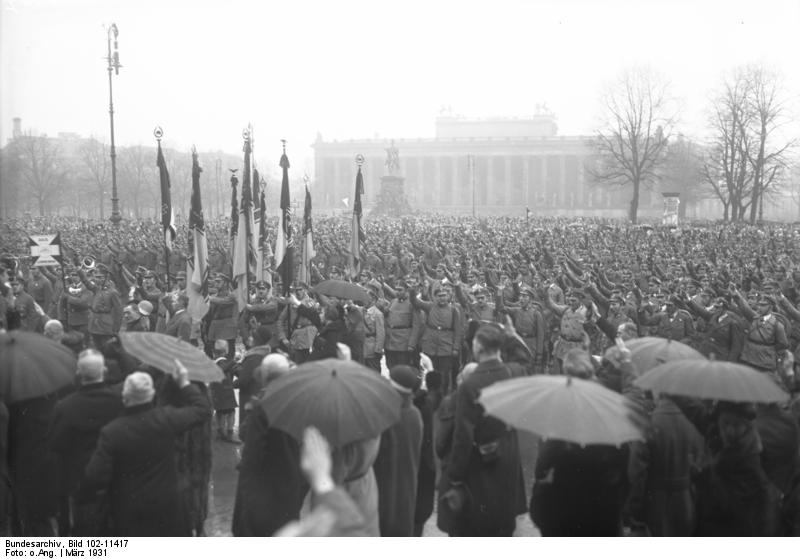 Der grosse Stahlhelmaufmarsch als Auftakt für das Volksbegehren im Lustgarten in Berlin! Zehntausende von Stahlhelmern beim Treueschwur im Lustgarten in Berlin.